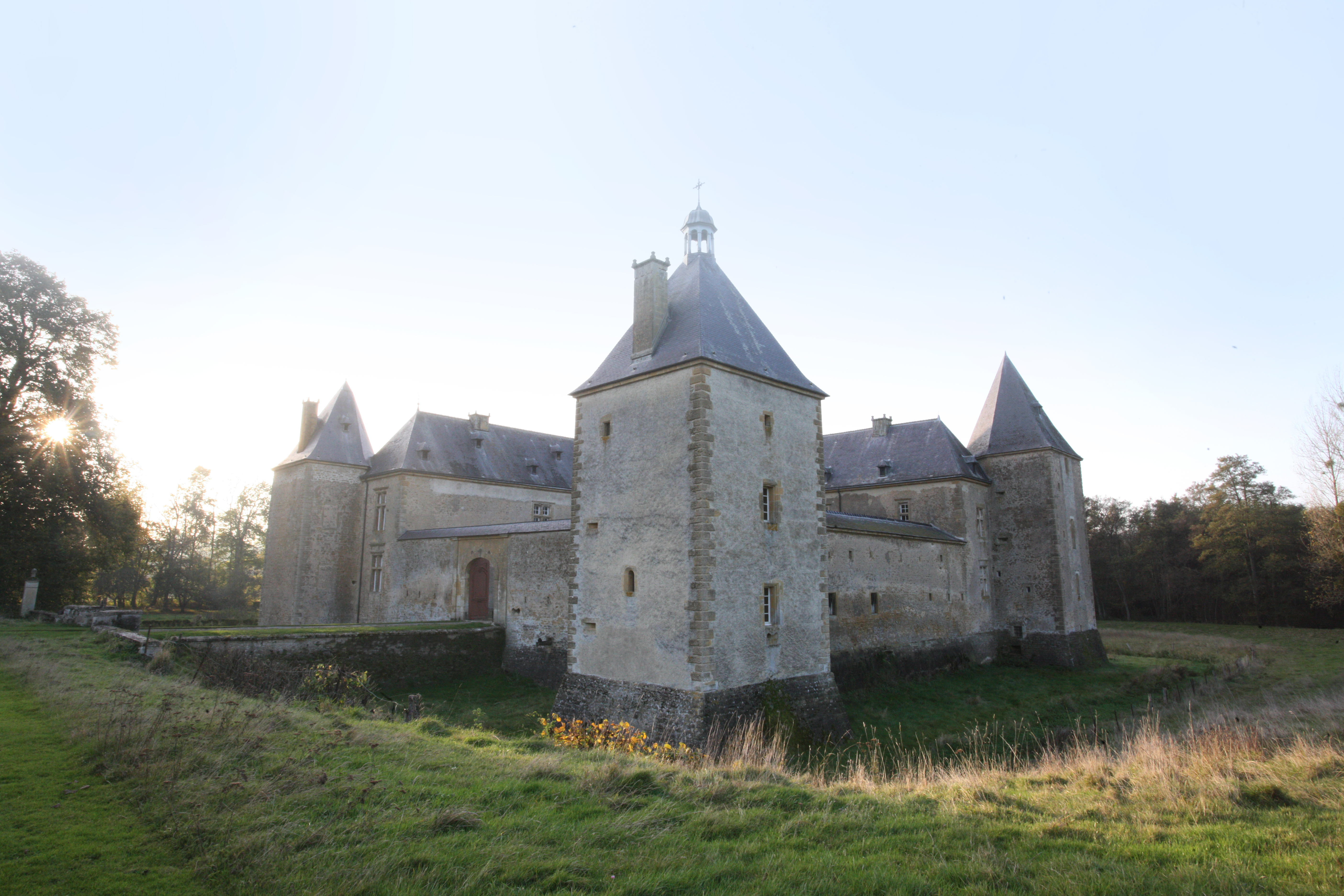 le Château de Tassigny, (classé:30 décembre 1991)